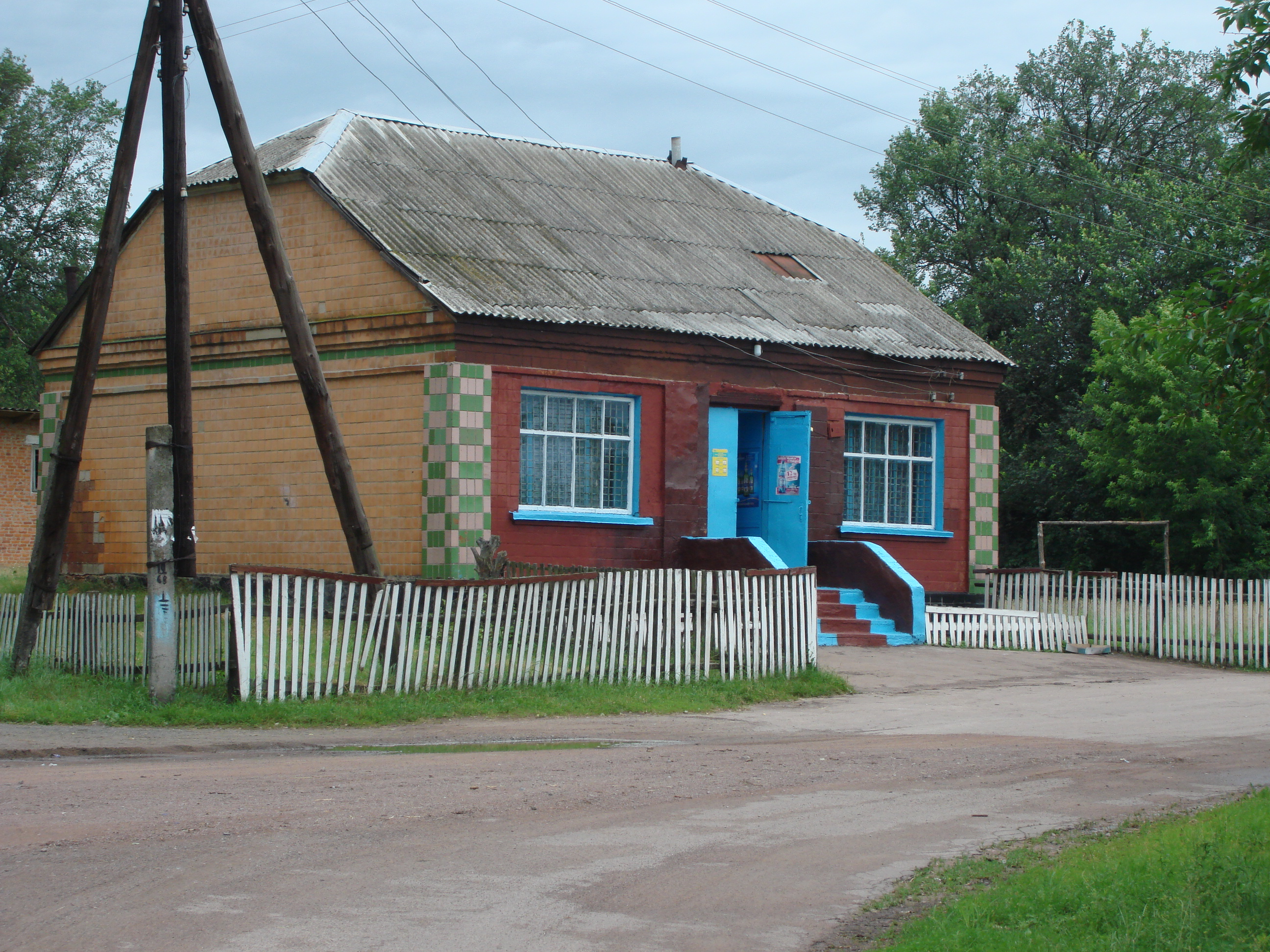 Сільмаг_с._Сингаї_Коростенського_району